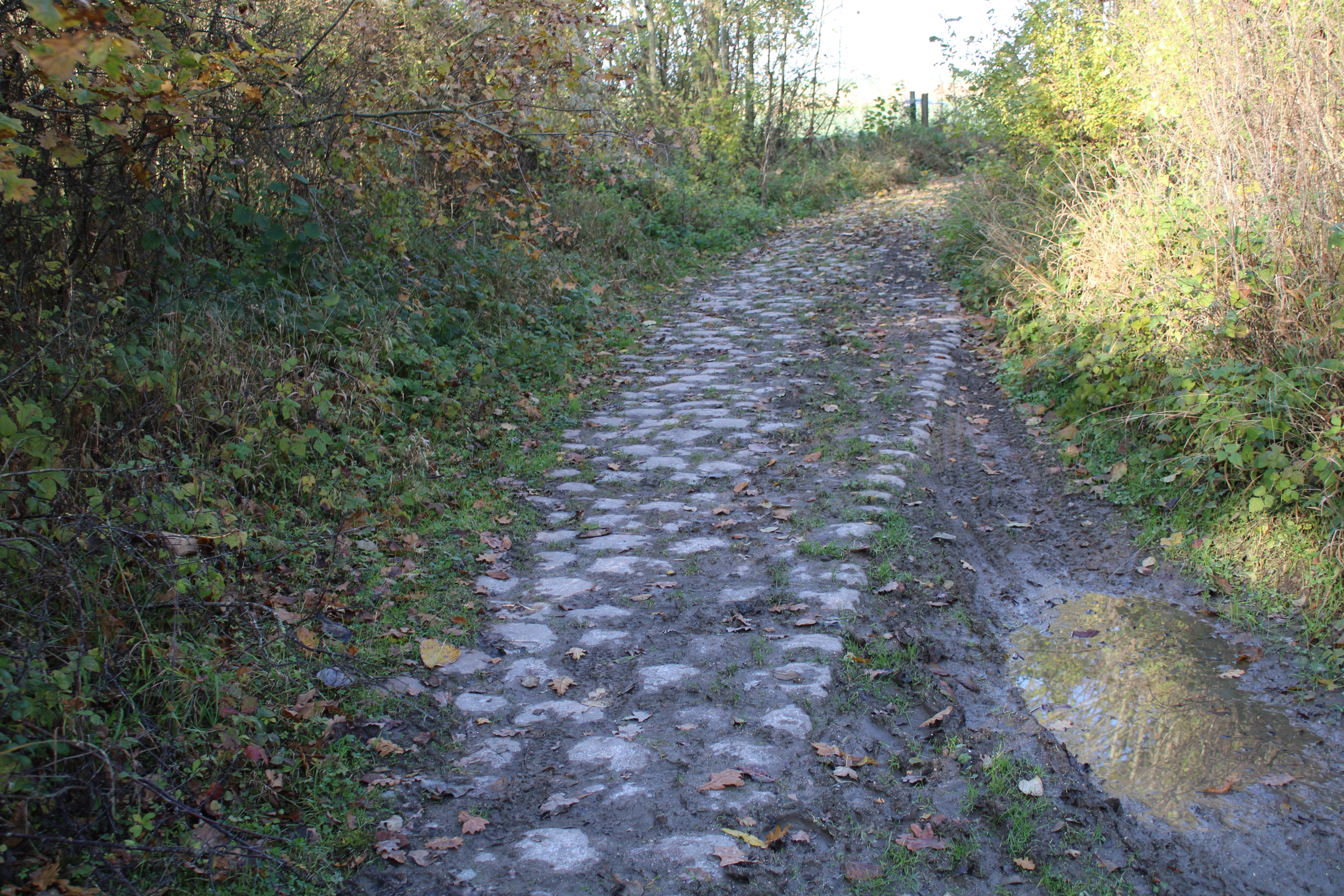 Saint-Martin-des-Prés Vestiges de la route pavée